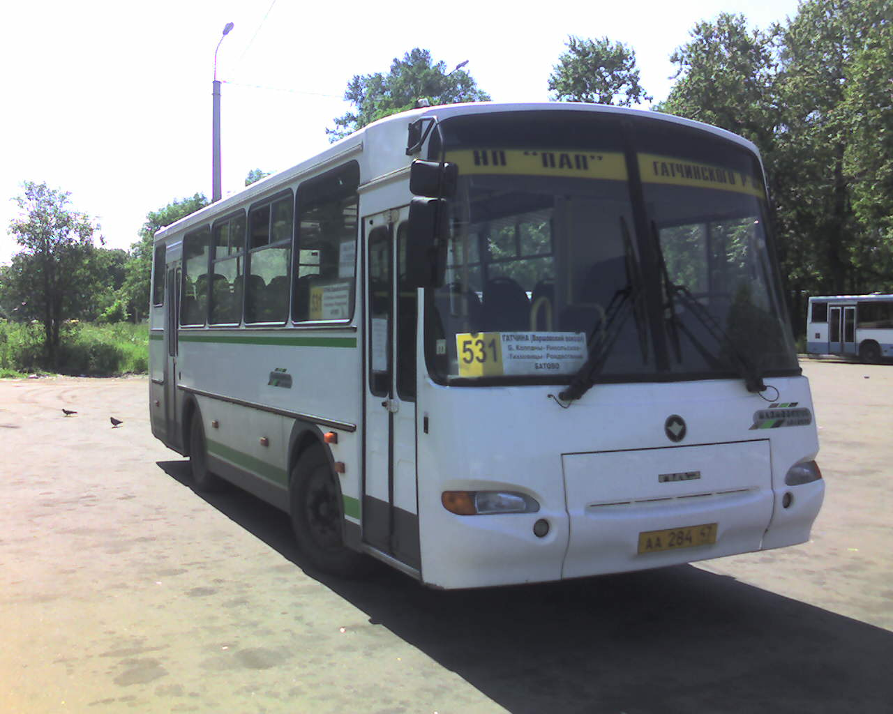 Автобус ПАЗ-4230 ООО "ПАП" маршрута №531 в Гатчине. - Bus PAZ-4230 OOO "PAP" in Gatchina